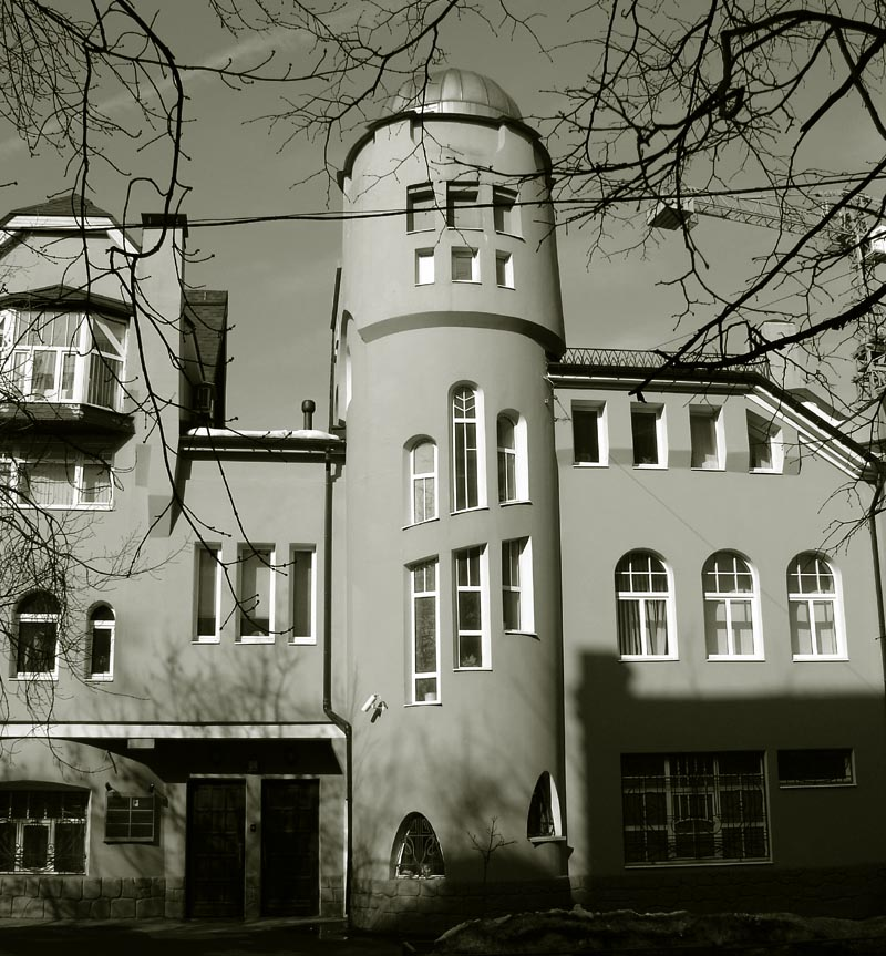 Москва, Вадковский переулок, 5. Здание построено в 1907 году архитектором А. У. Зеленко и педагогом С. Т. Шацким как учебно-воспитательный клуб для детей рабочих окраин Communal Club for Working Children, by Alexander Zelenko, 1907. Vadkovsky Lane, 5, Moscow, Russia (historical photos and other works by Zelenko - )